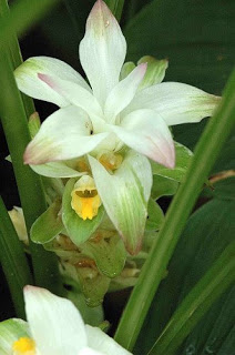 ফুলের রং টা সাদা।